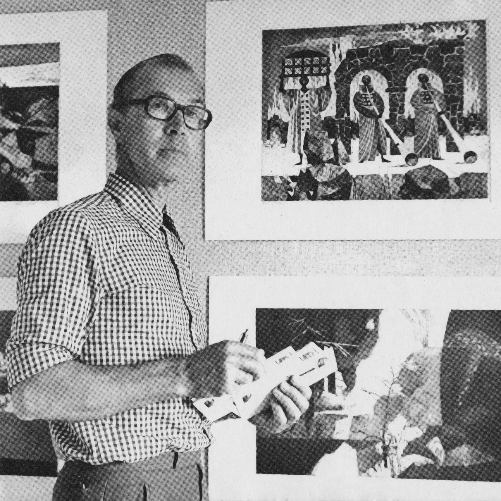 Utstilling av grafikk i Elvengaarden, Røros, 1975.